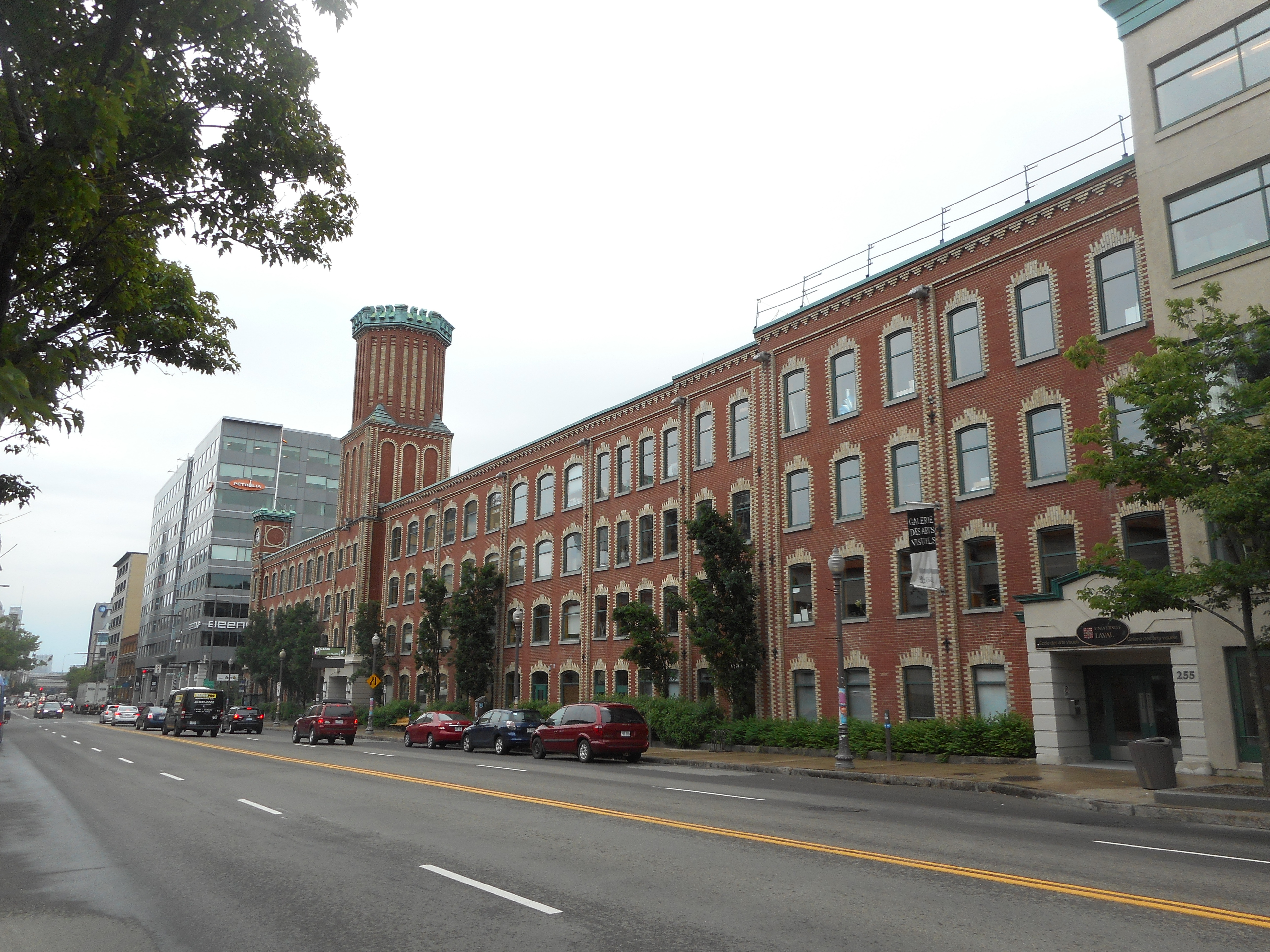 La Fabrique (ou Usine Dominion Corset), 295, boulevard Charest Est, Québec